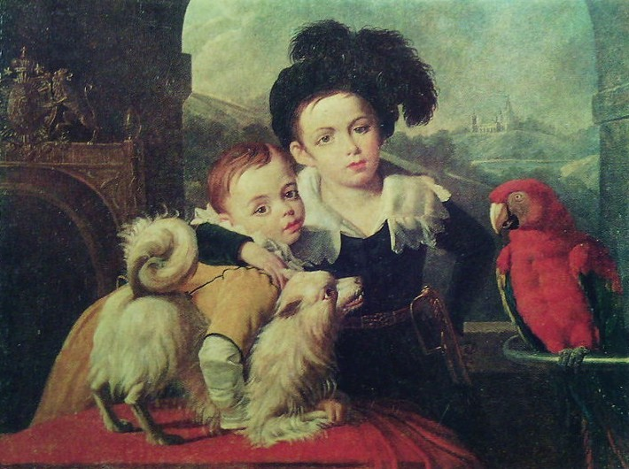 Портрет Сергея и Петра Колосовых (Гирейских), незаконных детей князя Н. Б. Юсупова от крепостной актрисы Екатерины Колосовой (1796 - 1816).